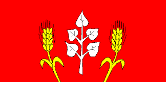 Vlajka obce Čavisov.